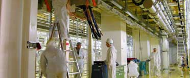 Installationsarbeiten für Versorgungstechnik in einem Industriekomplex